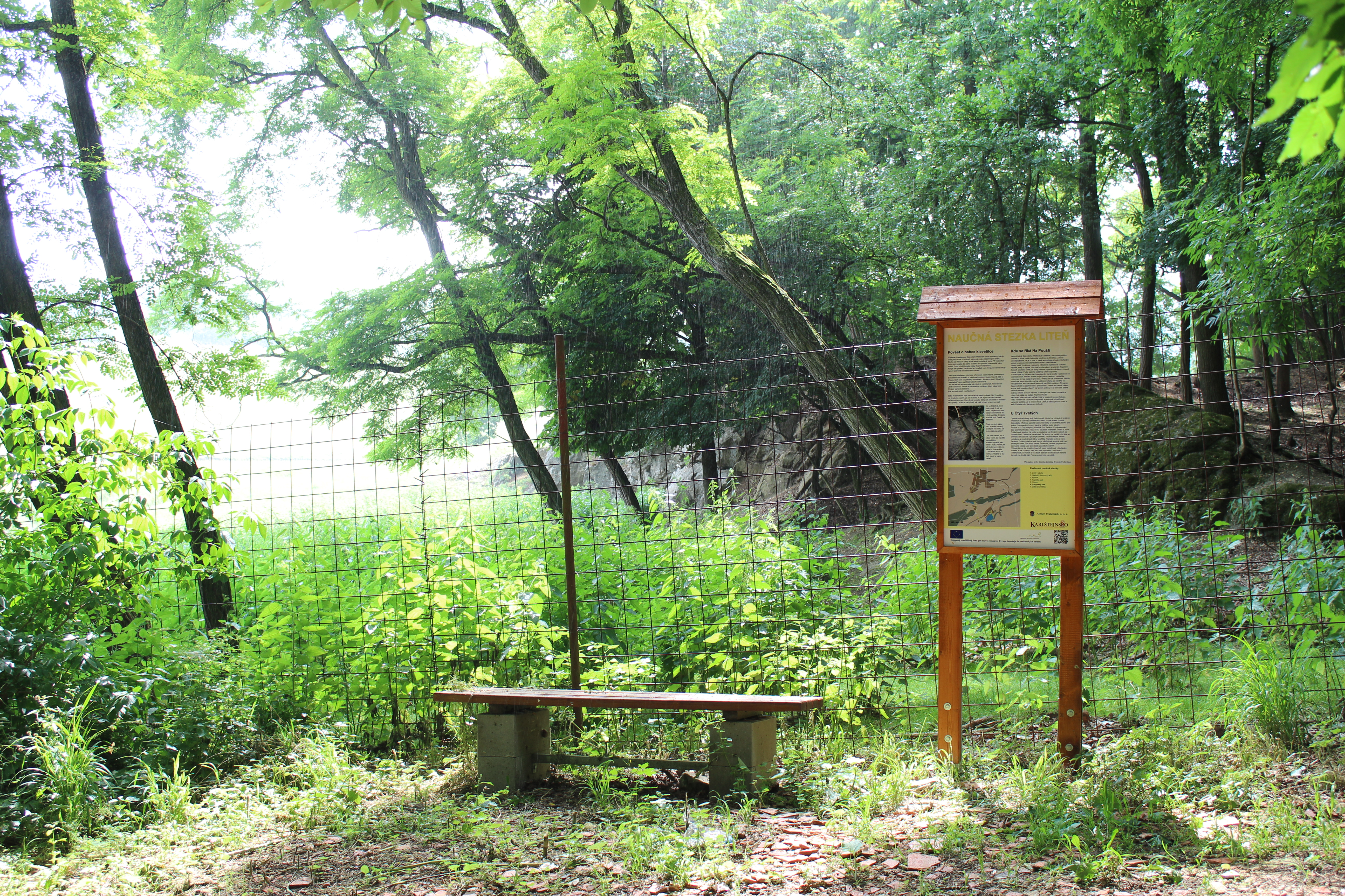 Babka klevetilka. Pohled informační panel a lavičku u zastavení Babka klevetilka Naučné stezky Liteň – žlutá stezka – zastavení: Obora, Skuhrov, Mlýny, Leč, Obora, Babka, Hřbitov. Za panelem je viditelné pletivo oplocení obory.Pověst o babce klevetilce na Naučné stezce Liteň u Obory Pod Cihelnou. Snímek vznikl na chráněném pracovním místě fotograf - pracovník pro dokumentaci vytvořeném společností Atelier Svatopluk, o.p.s. Liteň s podporou Úřadu práce ČR, krajská pobočka pro Středočeský kraj v Příbrami, kontaktní pracoviště v Berouně Jan Maňák